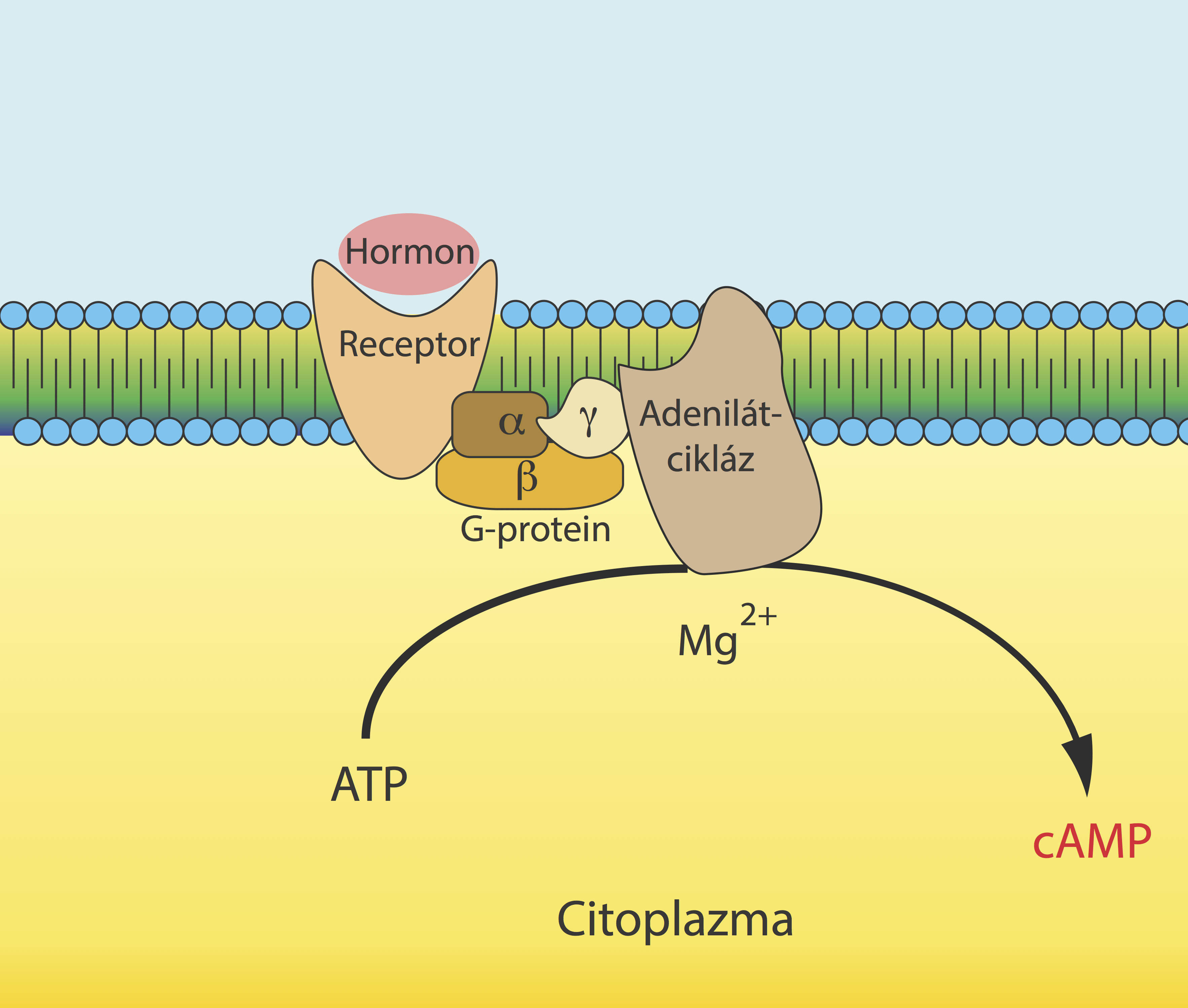 Sejtmembánba épült receptor, G-protein, adenilát-cikláz vázlatos rajza